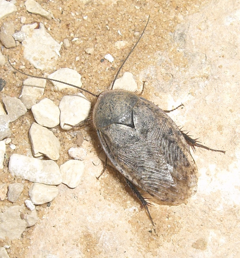 Arenivaga africana (male), Britania Park, Israel